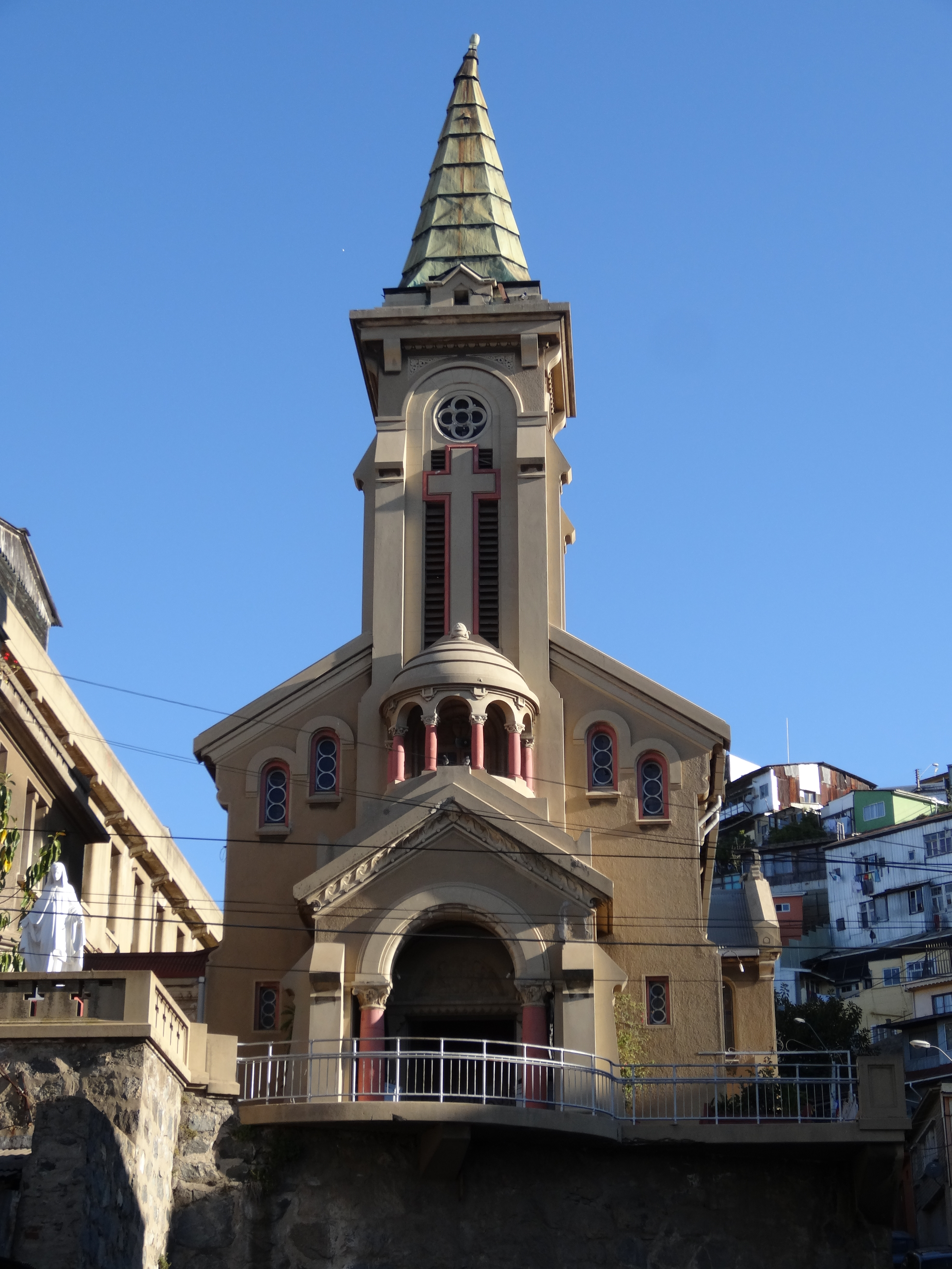 Capilla del Carmen This is a photo of a national monument in Chile: 584